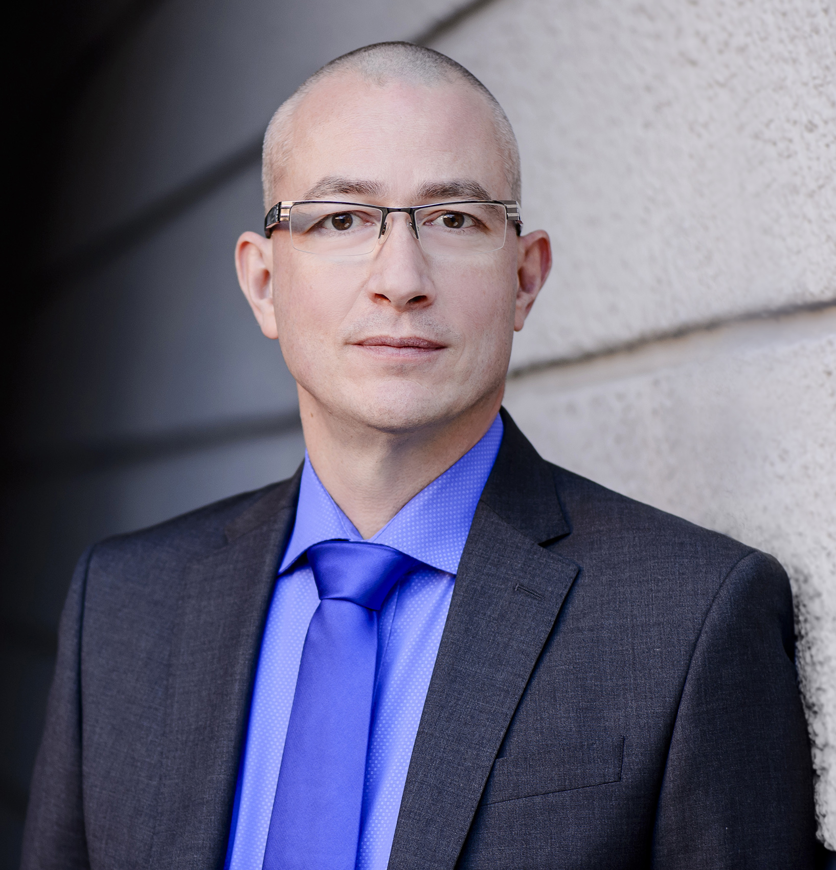 Hans-Jörg Müller (AfD)